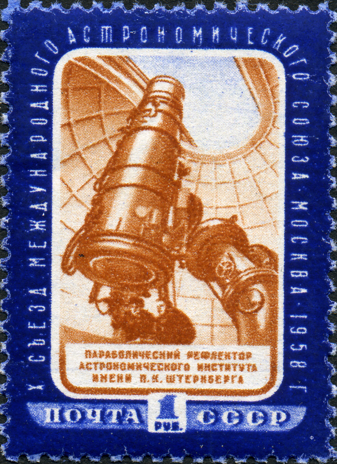 Марка СССР